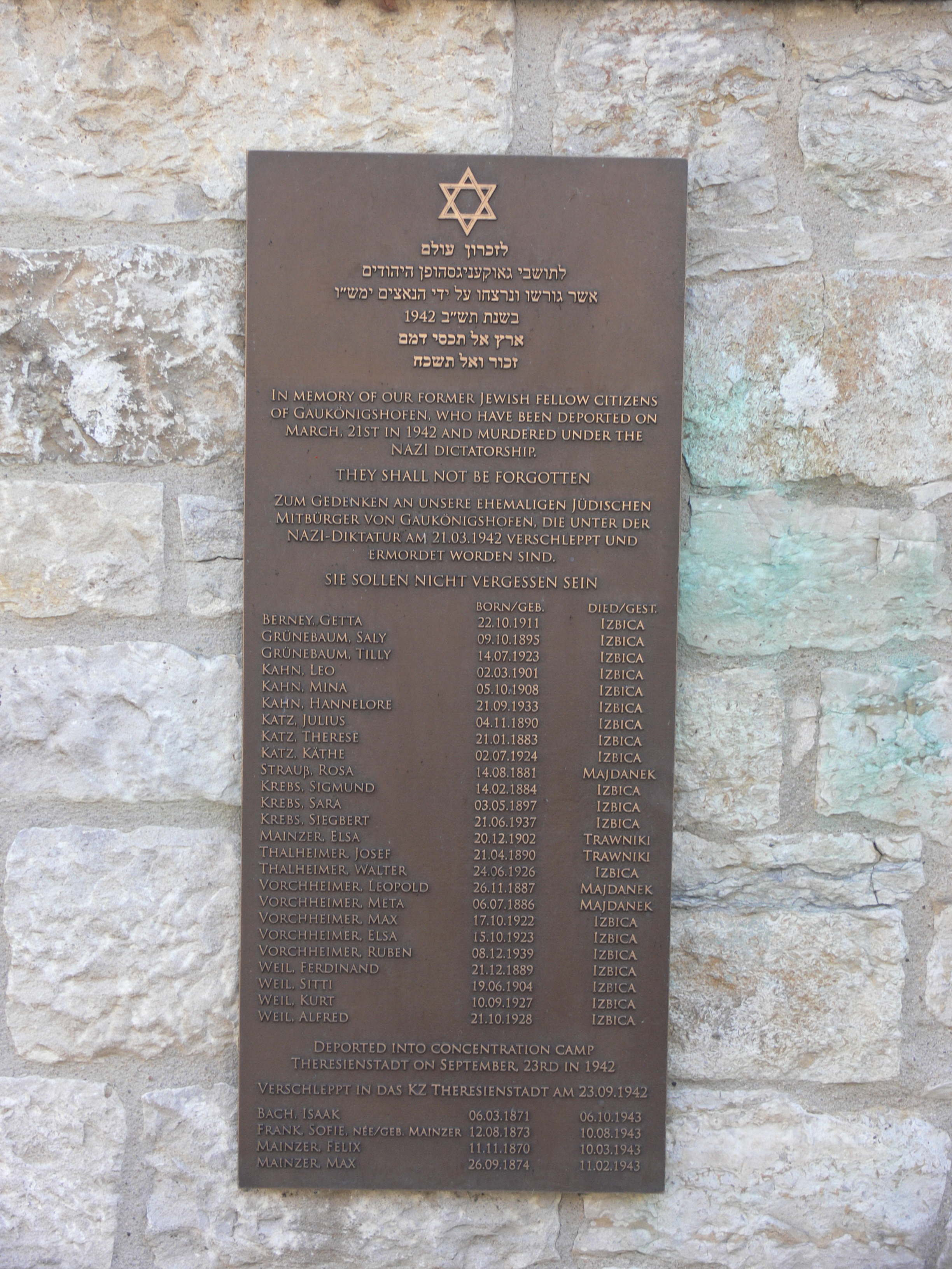 Gedenktafel an der ehemaligen Synagoge (Kreisgedenkstätte), Namensliste, Am Königshof 22, Gaukönigshofen, Unterfranken, Bayern, Deutschland